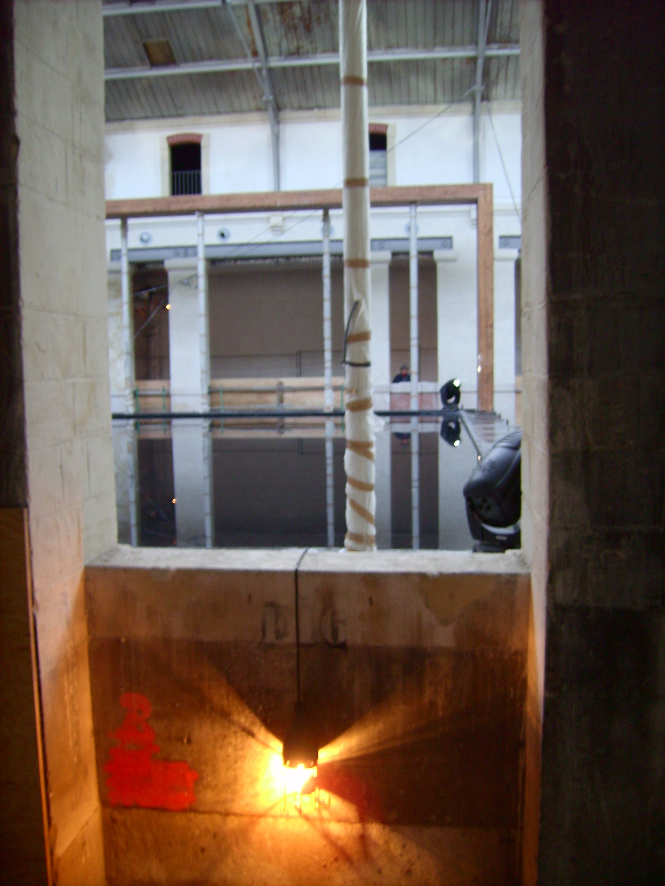 Le centre culturel du 104 (Paris) lors des journées portes ouvertes du chantier, le 29/12/2007.